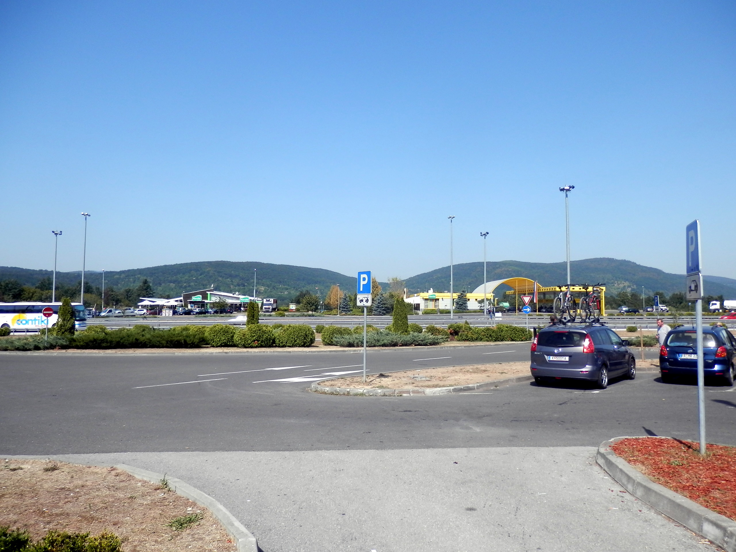 Diaľnice A1 v Chorvátsku odpočívadlo (odmorište) Dobra..Leto 2013.